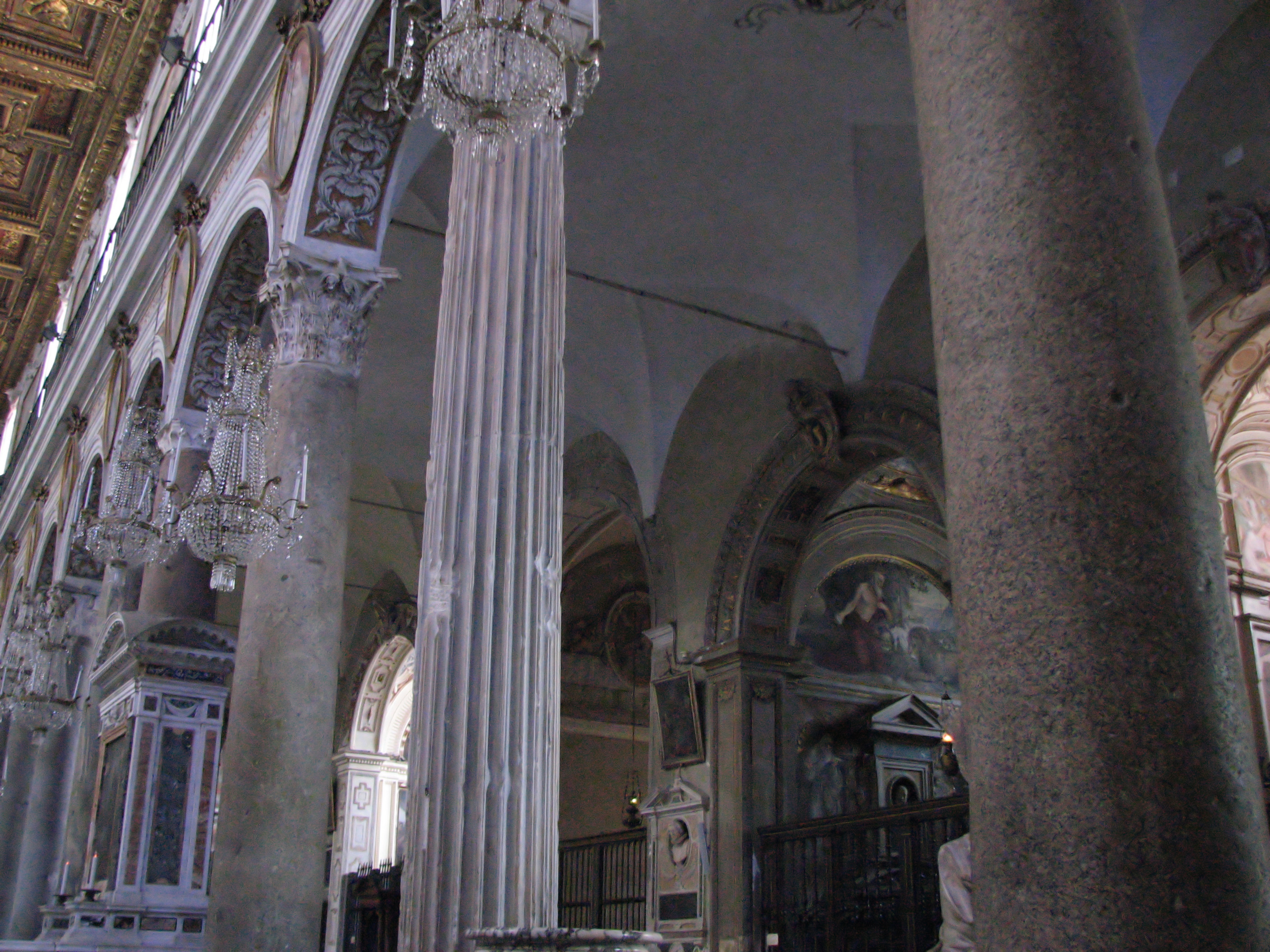 Interno della chiesa dell'Aracoeli, Roma, Lazio, Italia